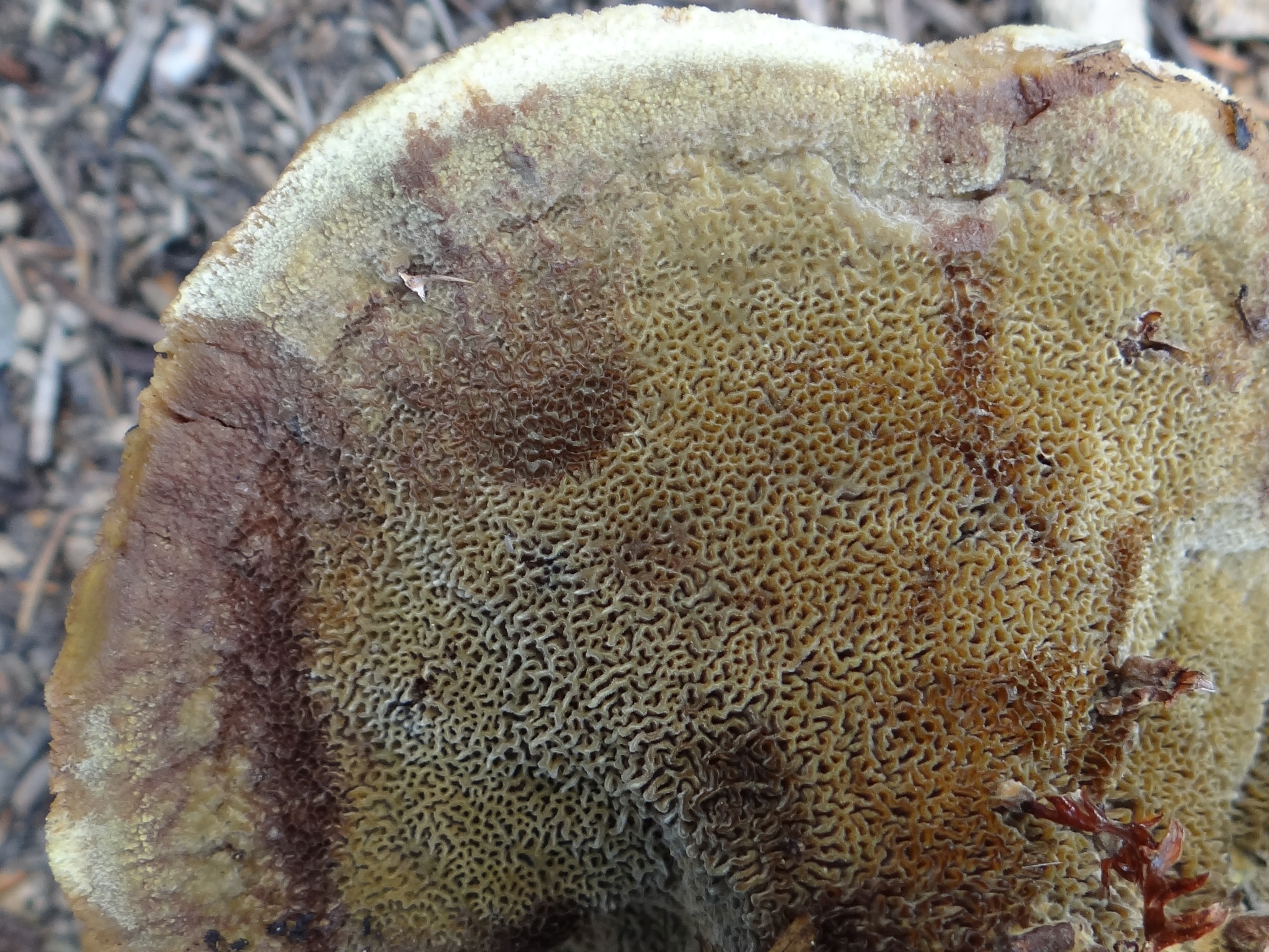 Phaeolus schweinitzii (location: Słowacja, Magura Spiska, Sowia Polana)